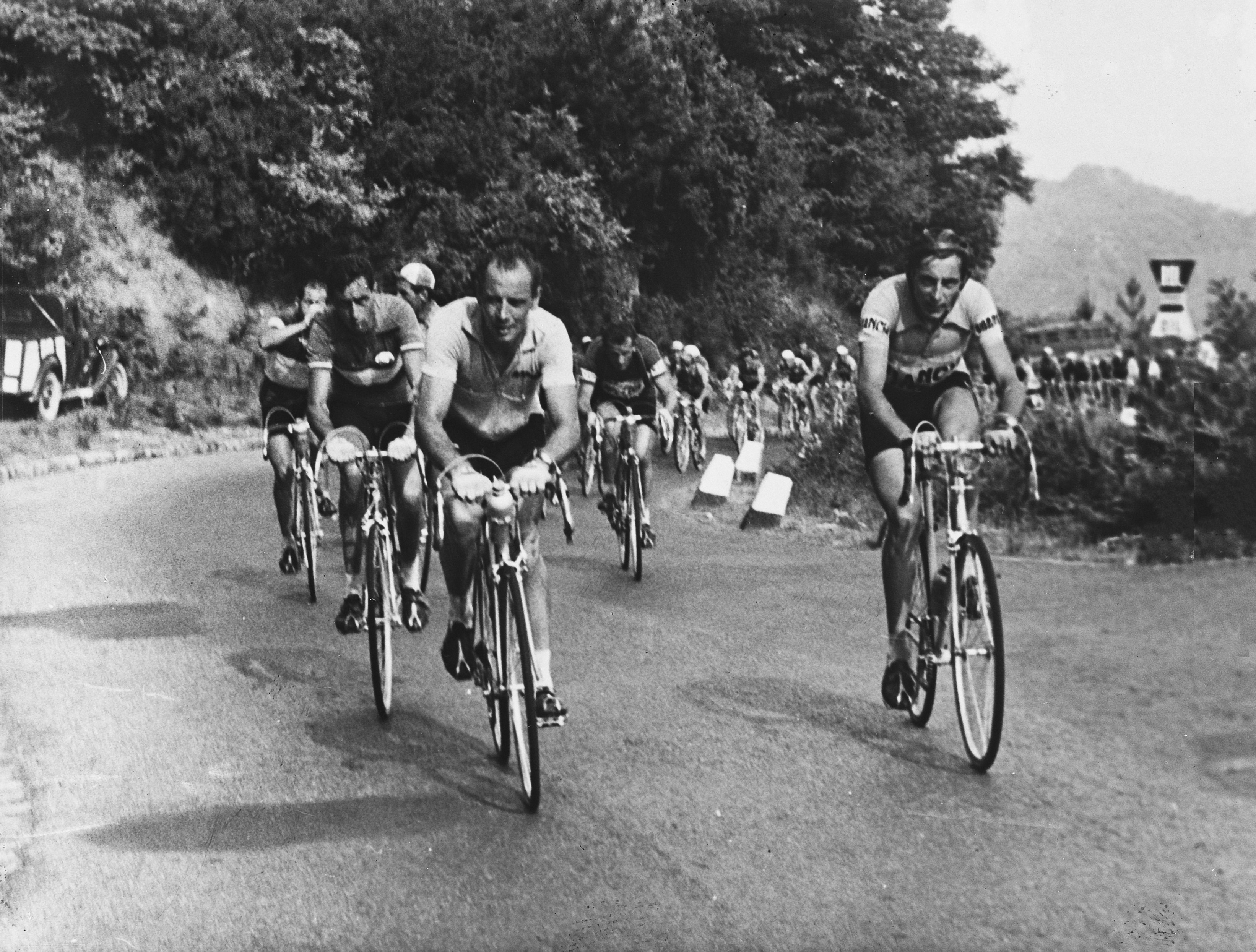 Ronde van Italie. 6e Etappe Kobled en Cappi